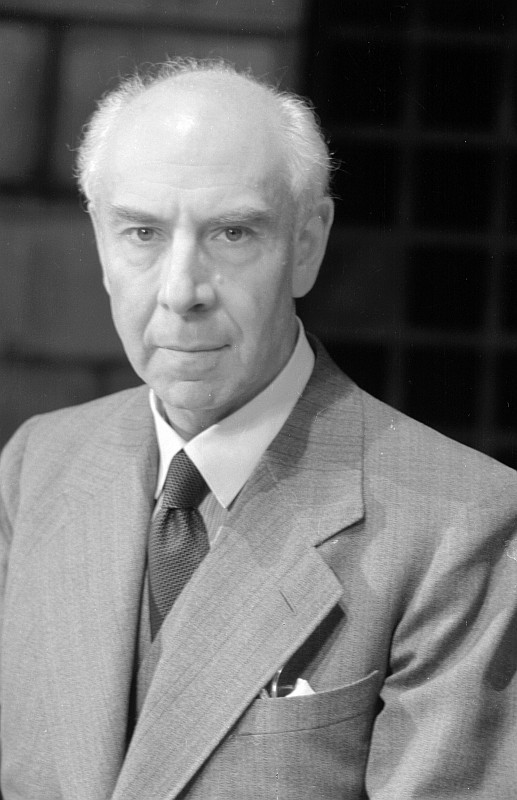 Original image description from the Deutsche Fotothek Porträt